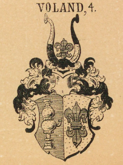 Armoiries d'origine de Michael Volandt avant 1570